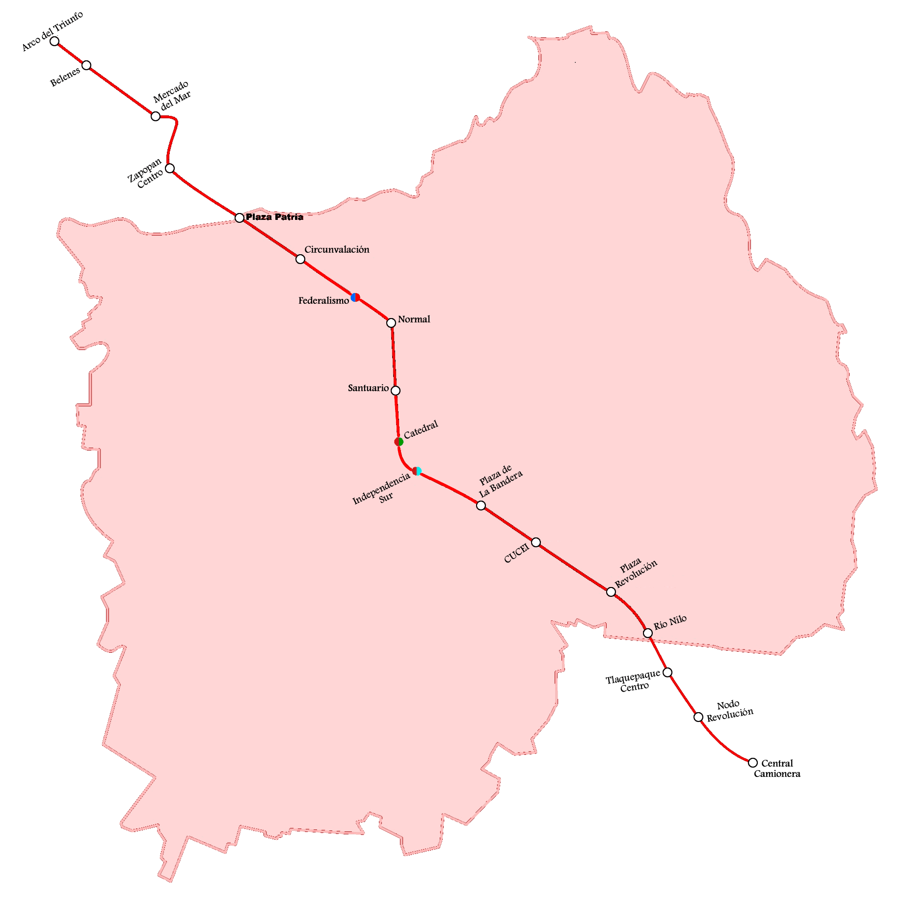 Plano de ruta correspondiente a la Línea 3 del Sistema de Tren Eléctrico Urbano de Guadalajara, Jalisco (México).